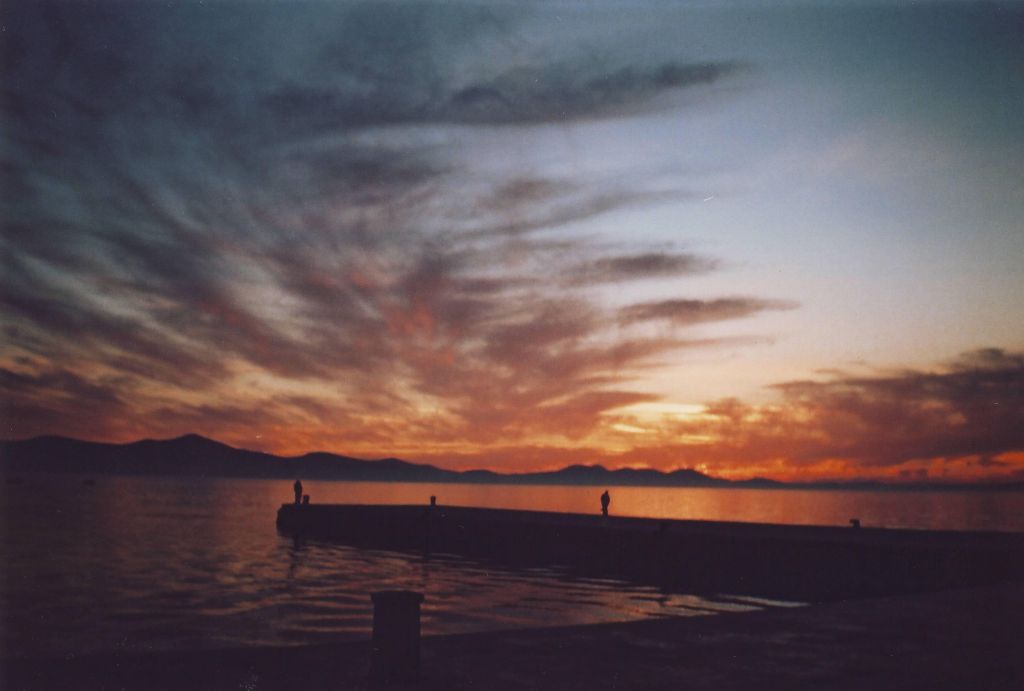 Zadar (Croatia) sunset